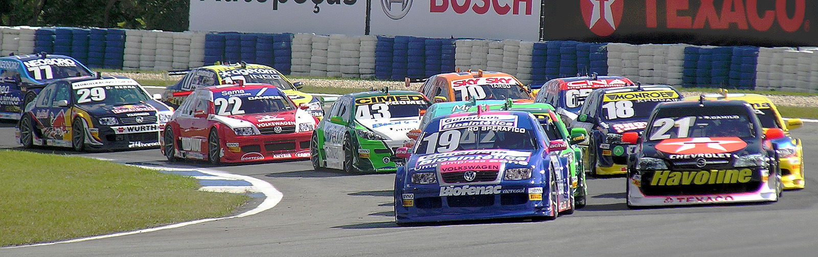 Stock Car Brasil, 2007 Curitiba#19 Rodrigo Sperafico, #21 Thiago Camilo, #18 Allan Khodair, #43 Pedro Gomes, #65 Felipe Gama, #70 Tarso Marques, #22 Júlio Campos, #17 Ingo Hoffmann, #29 Daniel Serra, #77 Valdeno Brito